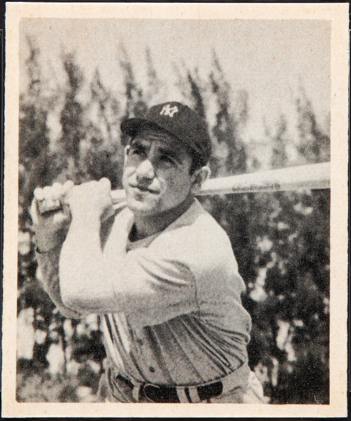 1948 Bowman Yogi Berra #6